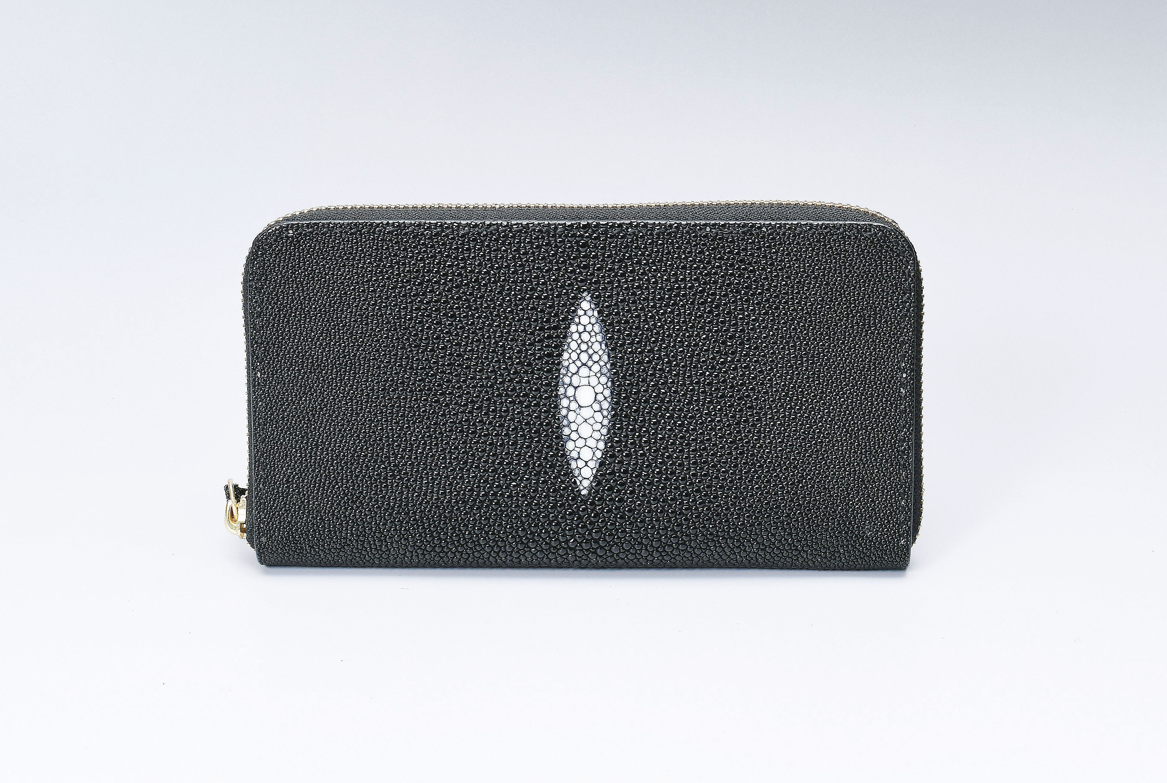 手縫製で作られた《ルナロッサ・ヨッピー》のエイ革財布